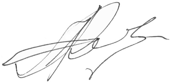 Подпись Кавалерова Александра Александровича